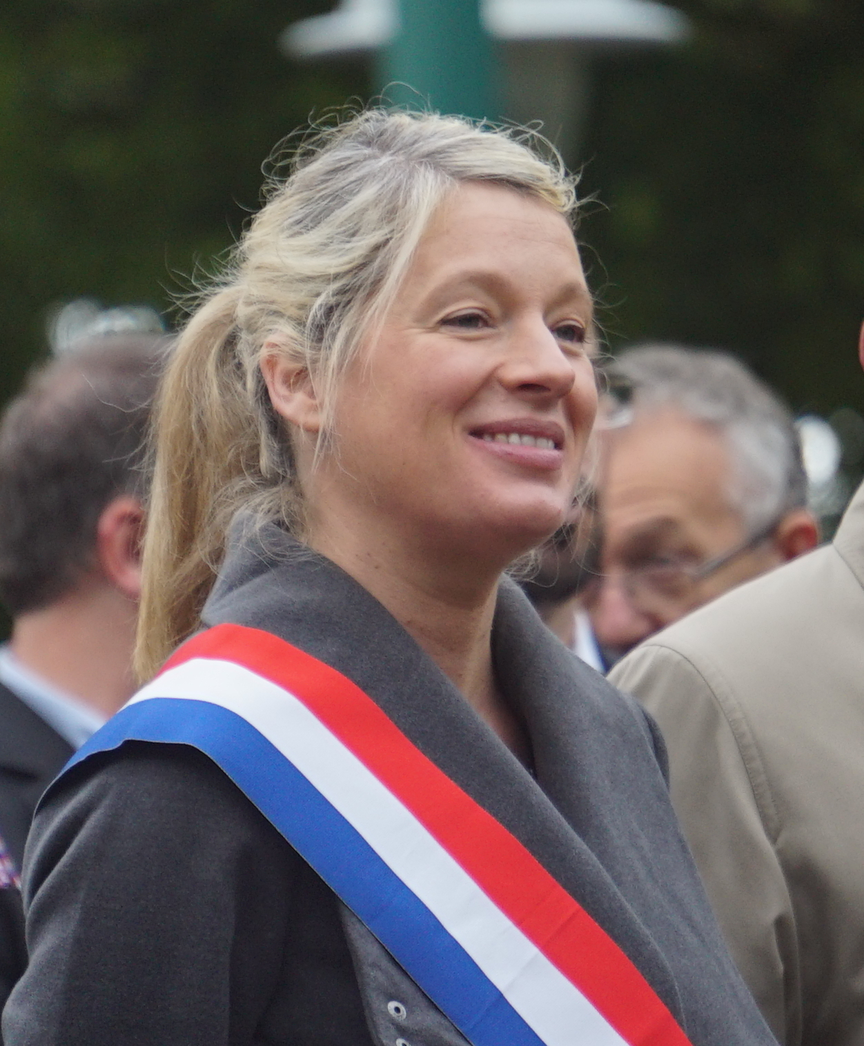 lors de la fête des drapeaux pour le centenaire.